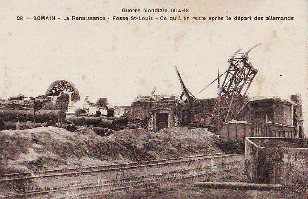 La Fosse Saint Louis de la Compagnie des mines d'Aniche était un charbonnage constitué d'un seul puits situé à Somain, Nord, Nord-Pas-de-Calais, France.